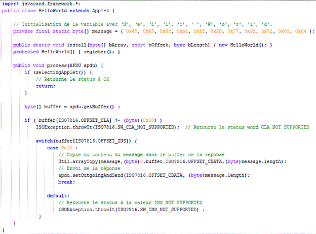 Hello world java card